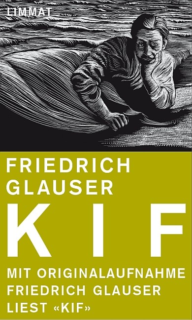 Cover von "KIF"